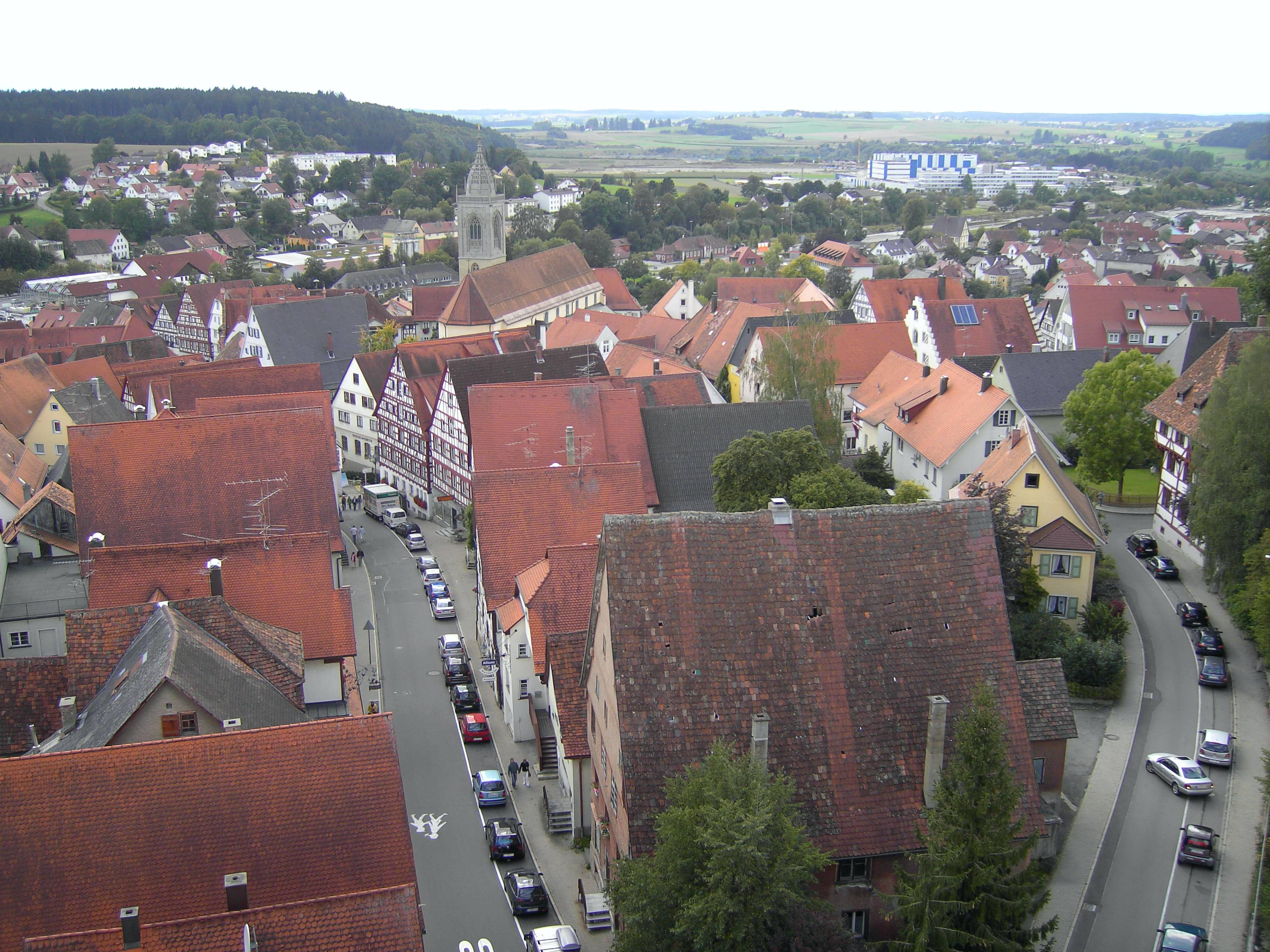 Pfullendorf. Blick vom Turm des Oberen Tores nach Süden